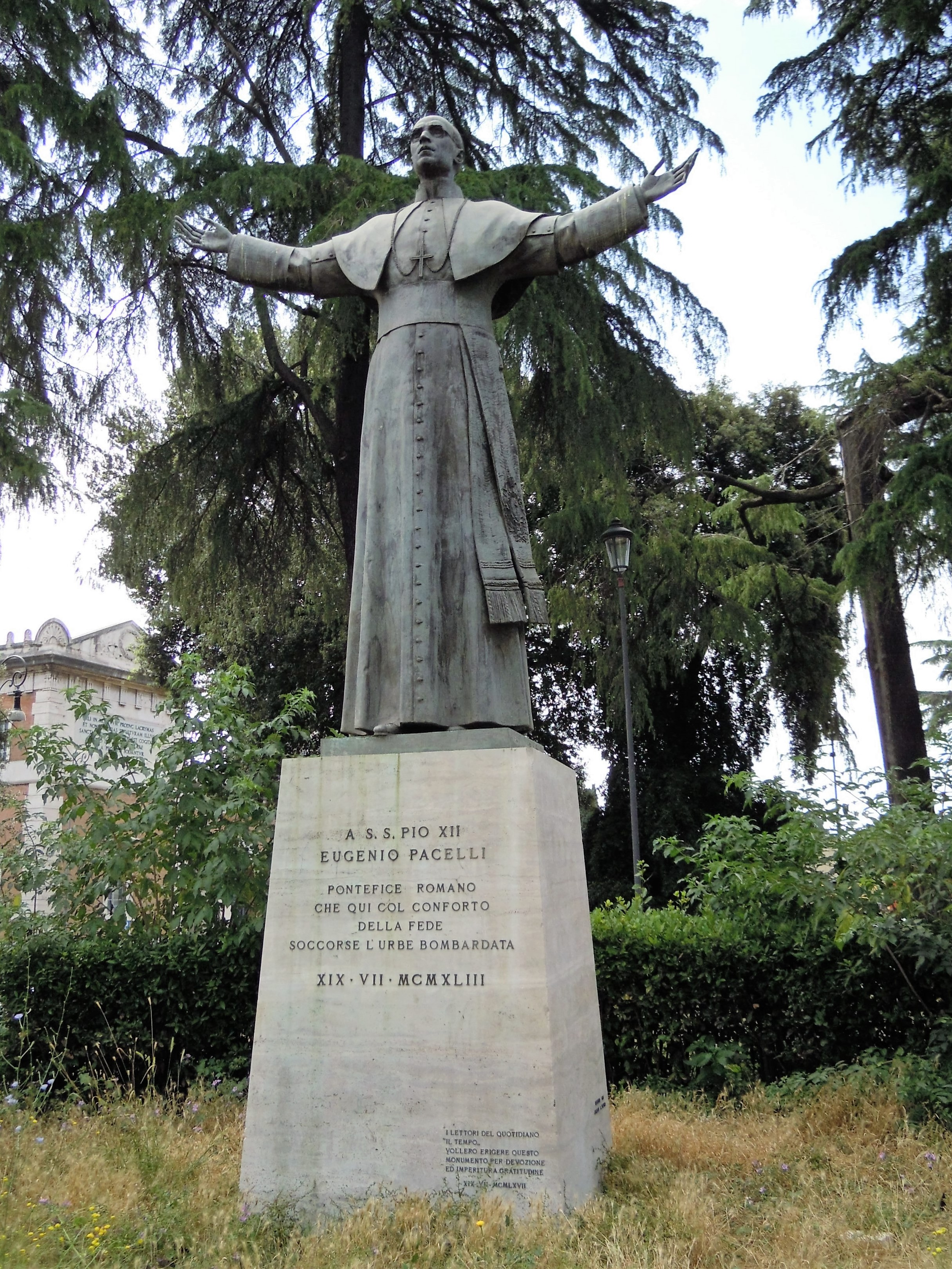 Roma, quartiere Tiburtino: monumento a Pio XII in ricordo del bombardamento di San Lorenzo